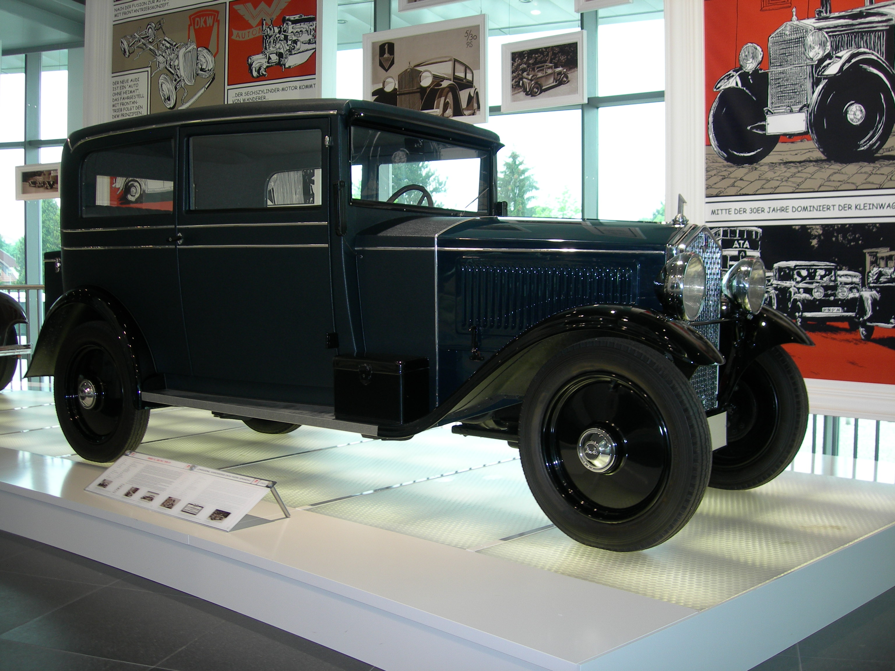 Audi Typ P (1931)